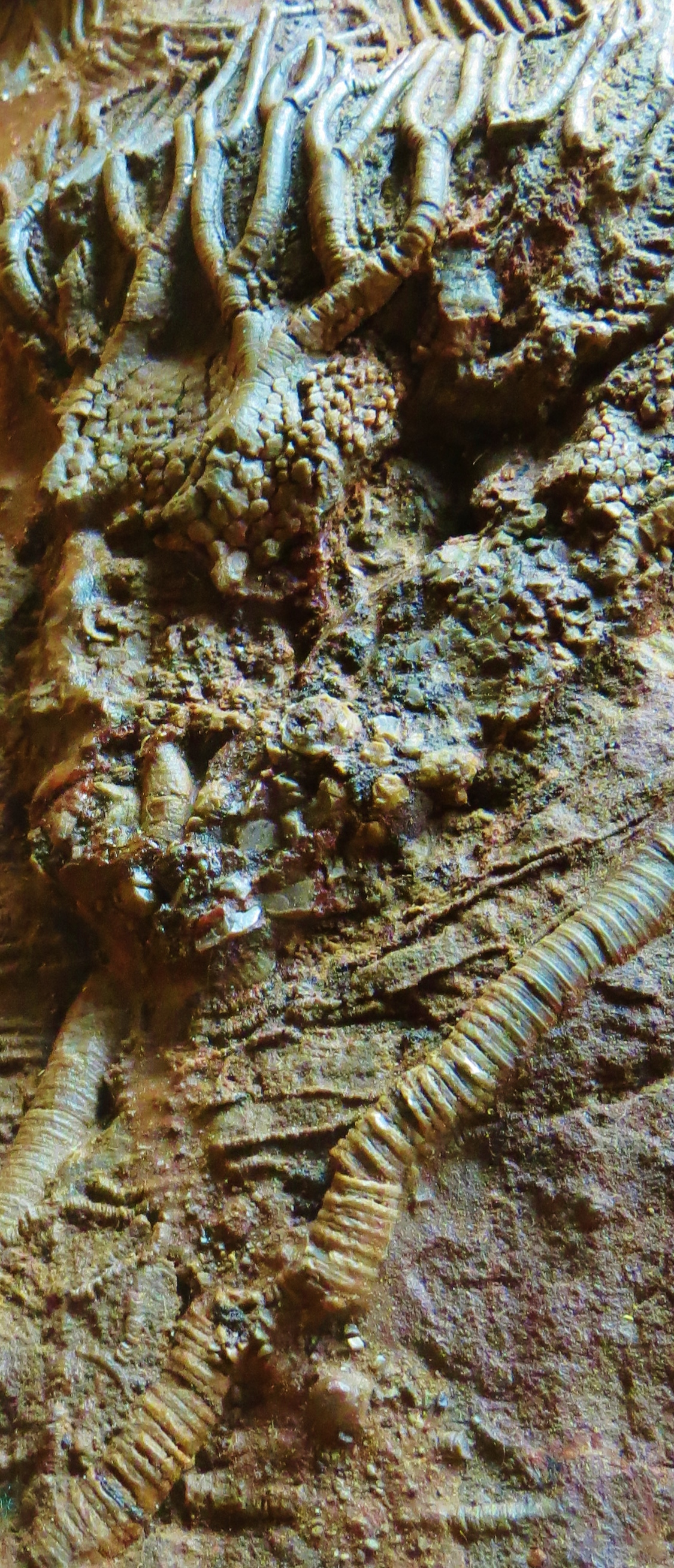 Fossil of Scyphocrinus, an extinct crinoid- Took the picture at Museo di Storia naturale “Antonio Stoppani” - Venegono Inferiore